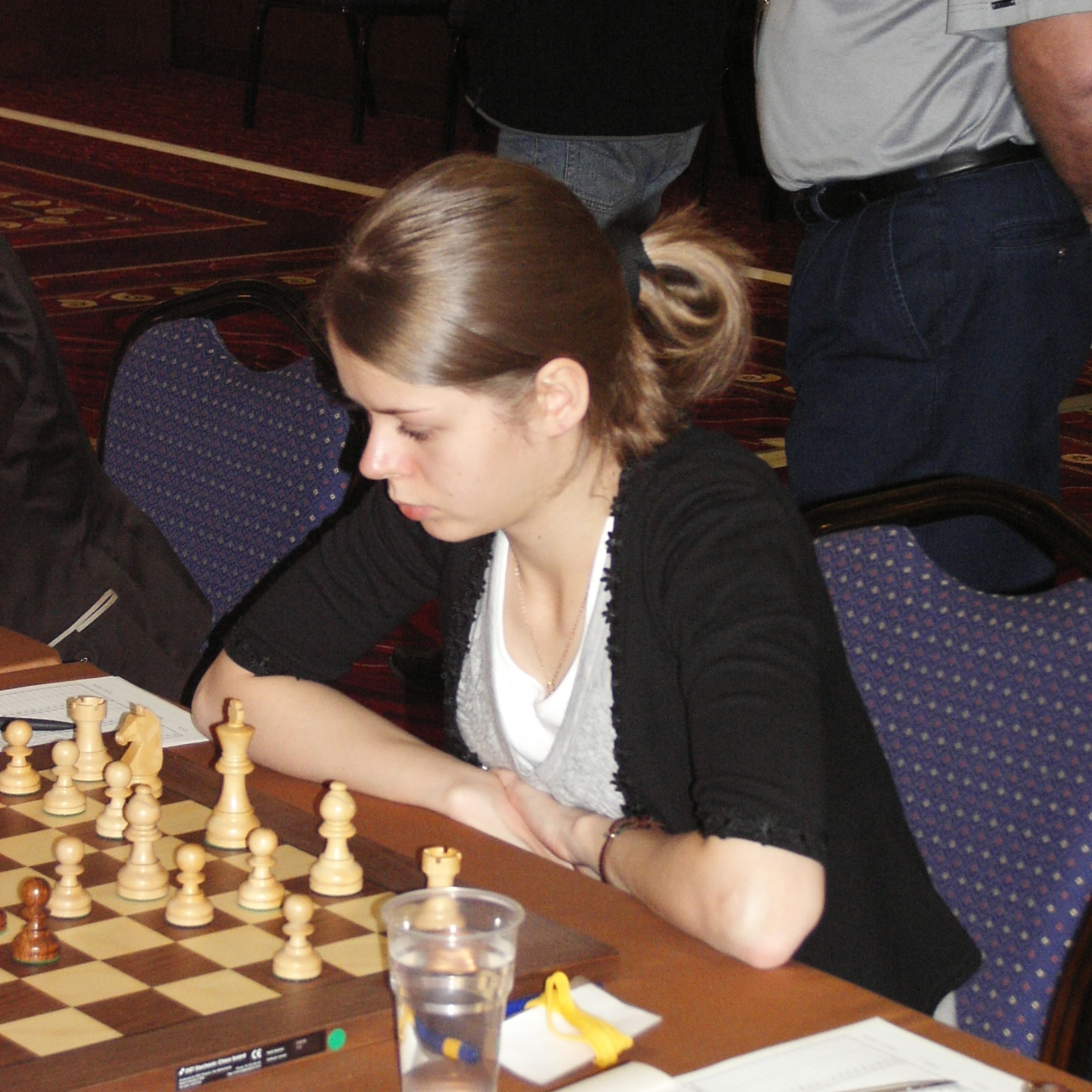 WGM Tatiana Kosintseva Russia, EuroChess Iraklion 2007